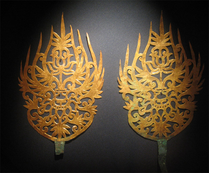 Baekje-Gold diadem